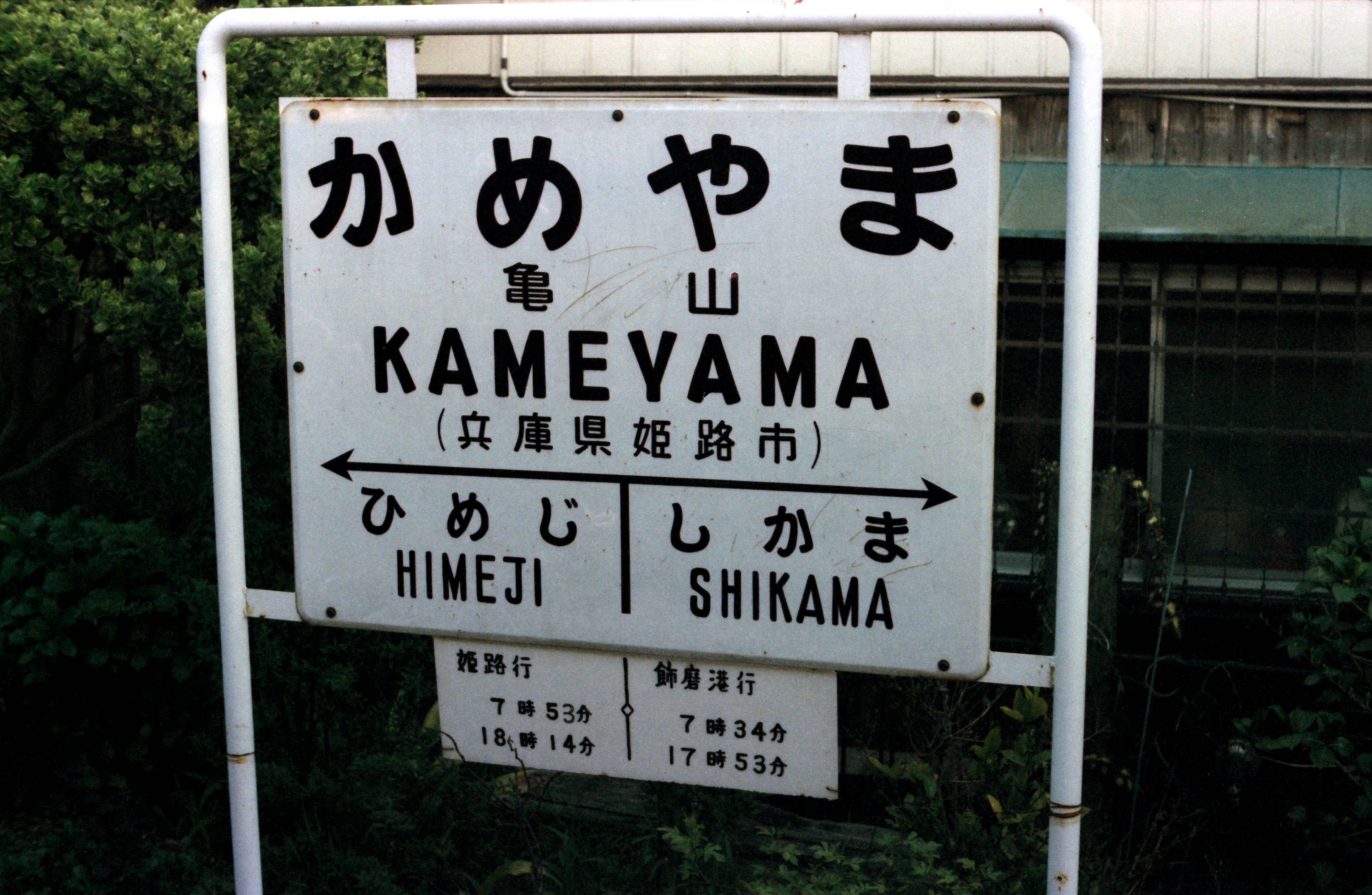 国鉄 播但線飾磨港支線 亀山駅